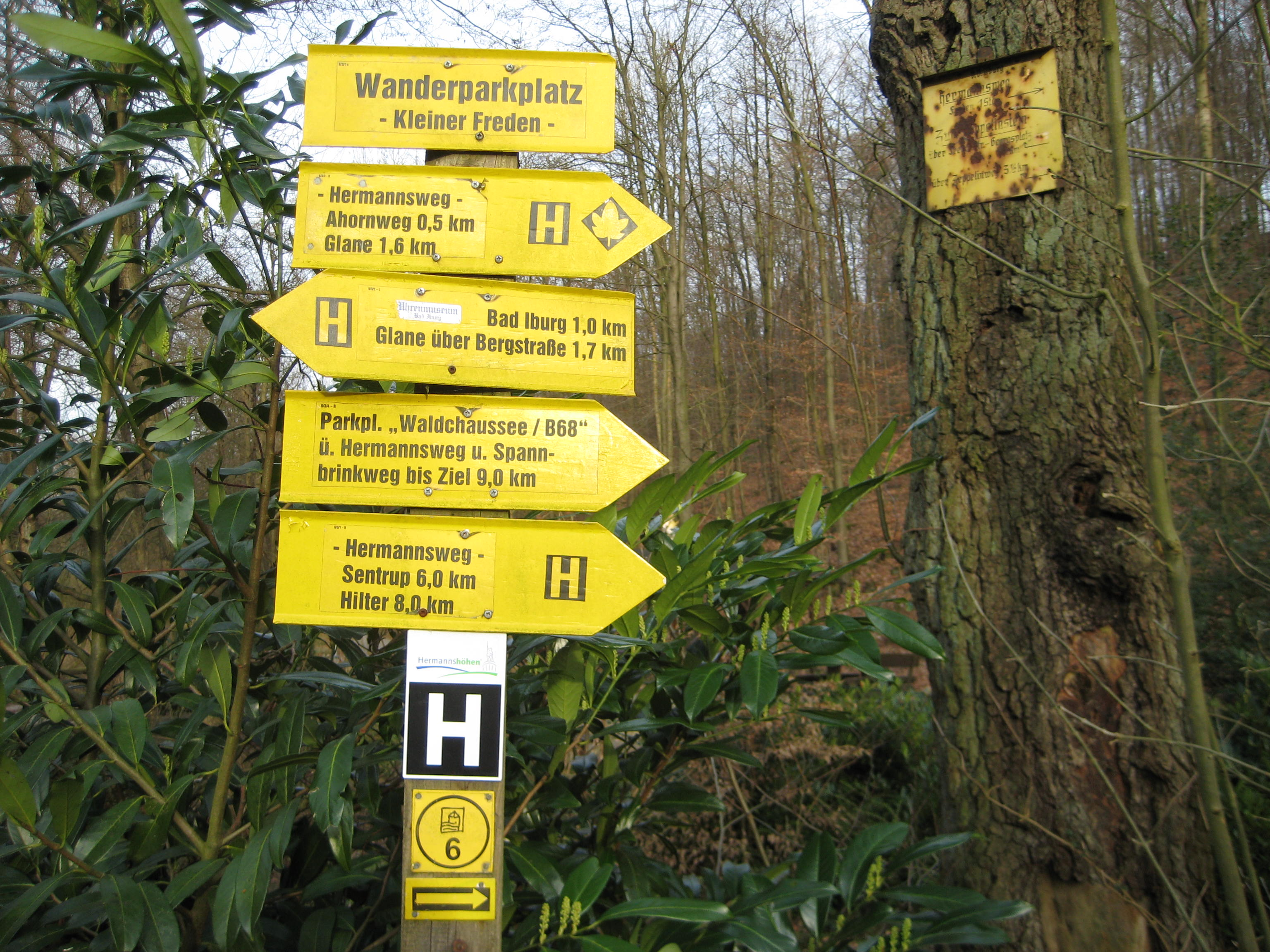 Ausschilderung am Freeden